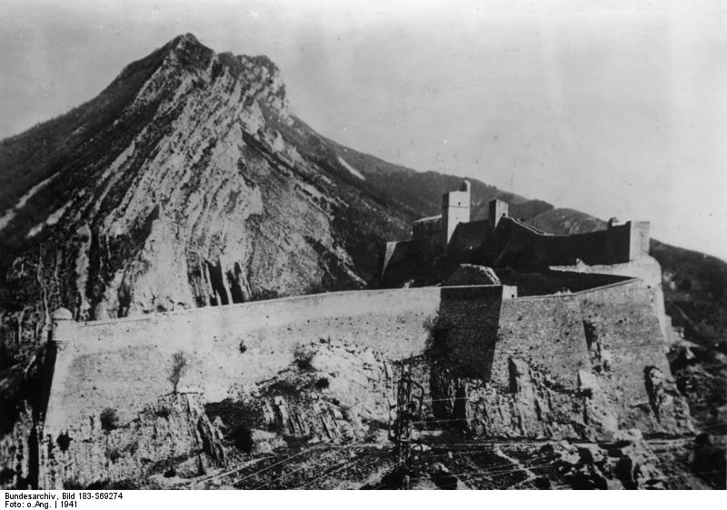 Frankreich, Zitadelle von Sisteron Anblick der Zitadelle von Sisteron, Sonderaufenthaltsort für Juden und andere unerwünschte Elemente. "Nach Sisteron gehen" ist im nicht besetzten Gebiet Frankreichs zu einer oft gehörten Redensart geworden. In diese mittelalterliche Zitadelle, errichtet auf einem steilen Felsen in herrlicher Lage im Departement der "Basses Alpen", werden seit dem Waffenstillstand jene verschickt, die in Südfrankreich (von Lyon bis Menton) als "unerwünscht" abgeurteilt werden. Tausende zweifelhafter Individuen, die sehr oft nicht mehr angeben konnten, woher sie die Mittel zu ihrer Existenz bezogen, wurden festgenommen und auf diese ausgedehnte Zitadelle gebracht, die eine der schönsten und noch (fast) unversehrt erhaltenen in Frankreich ist.